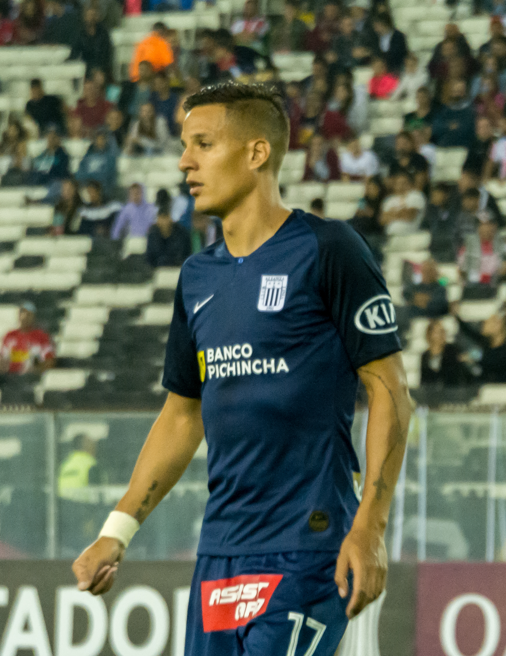 Gonzalo Godoy, Palestino vs Alianza Lima, Estadio Monumental, Macul, Santiago, Chile.